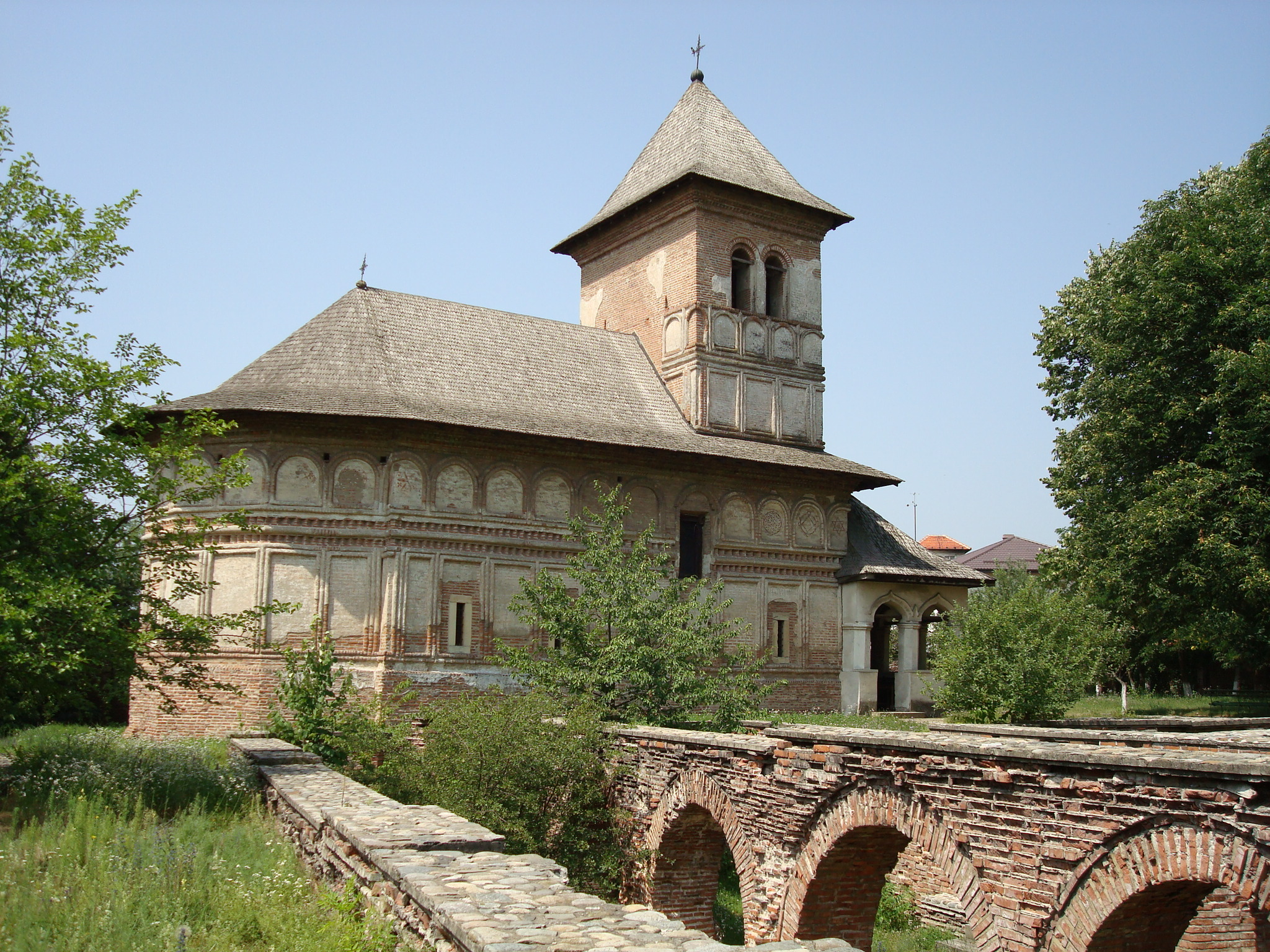 Mănăstirea Strehaia